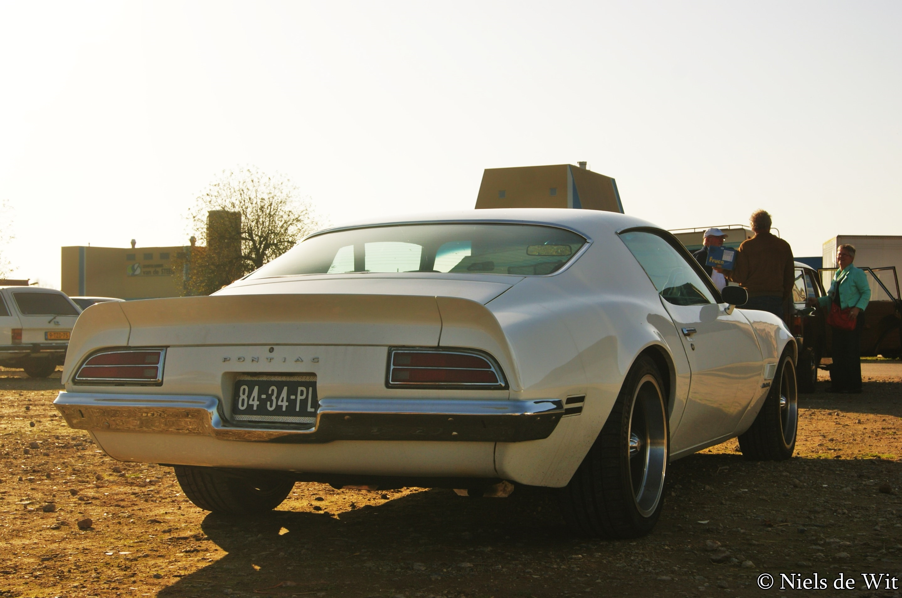 84-34-PL